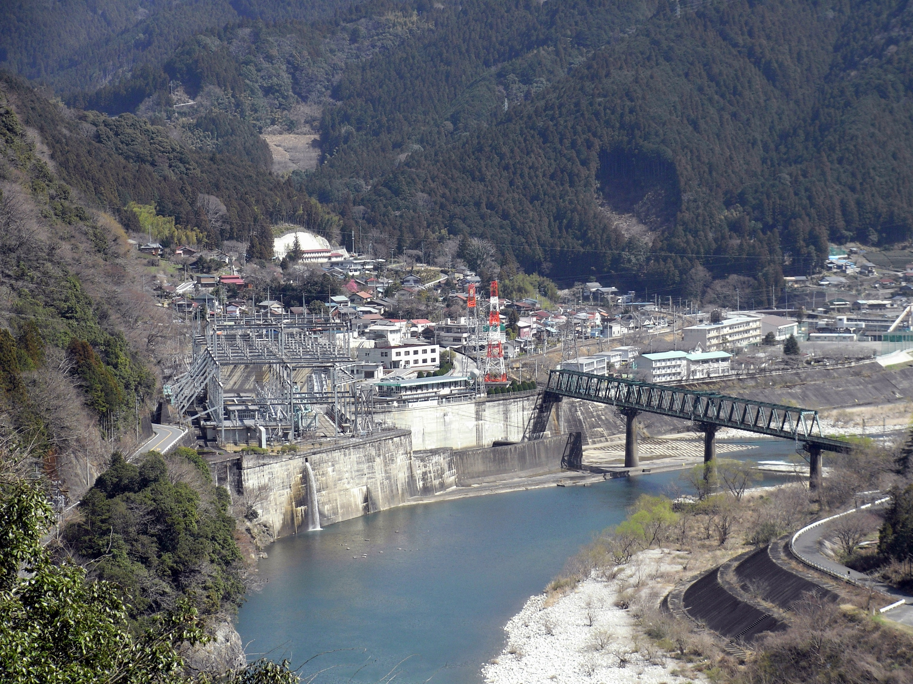 Dam